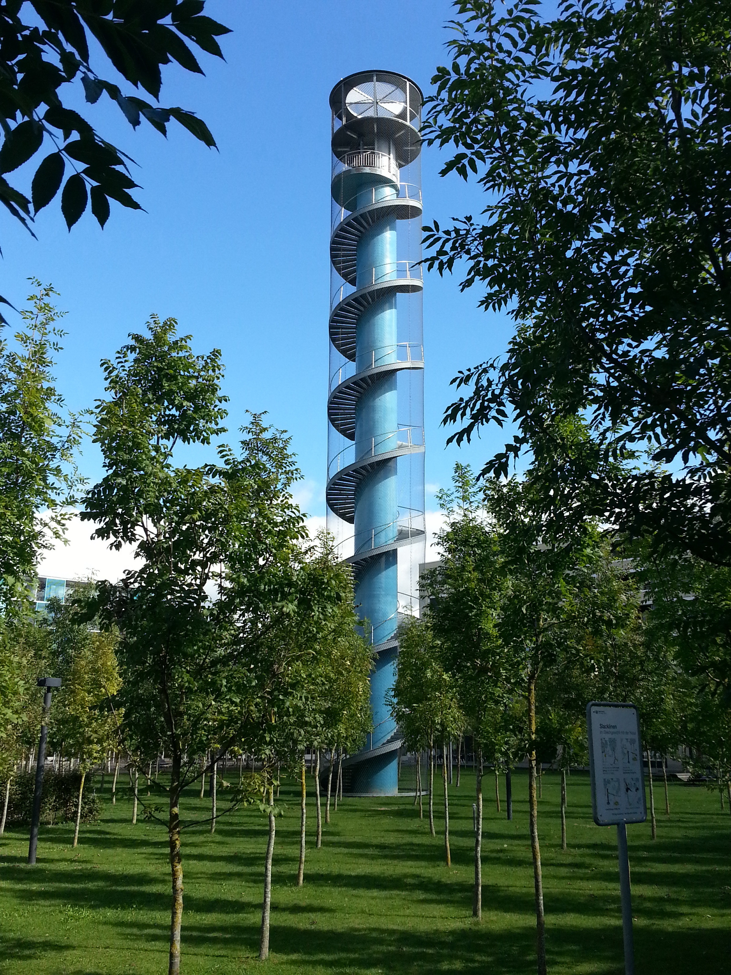 Oerlikon Turm